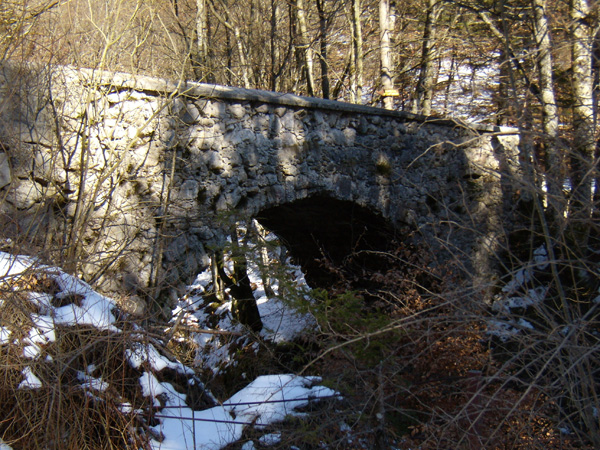 Hudičev most v Vojah (Bohinj).